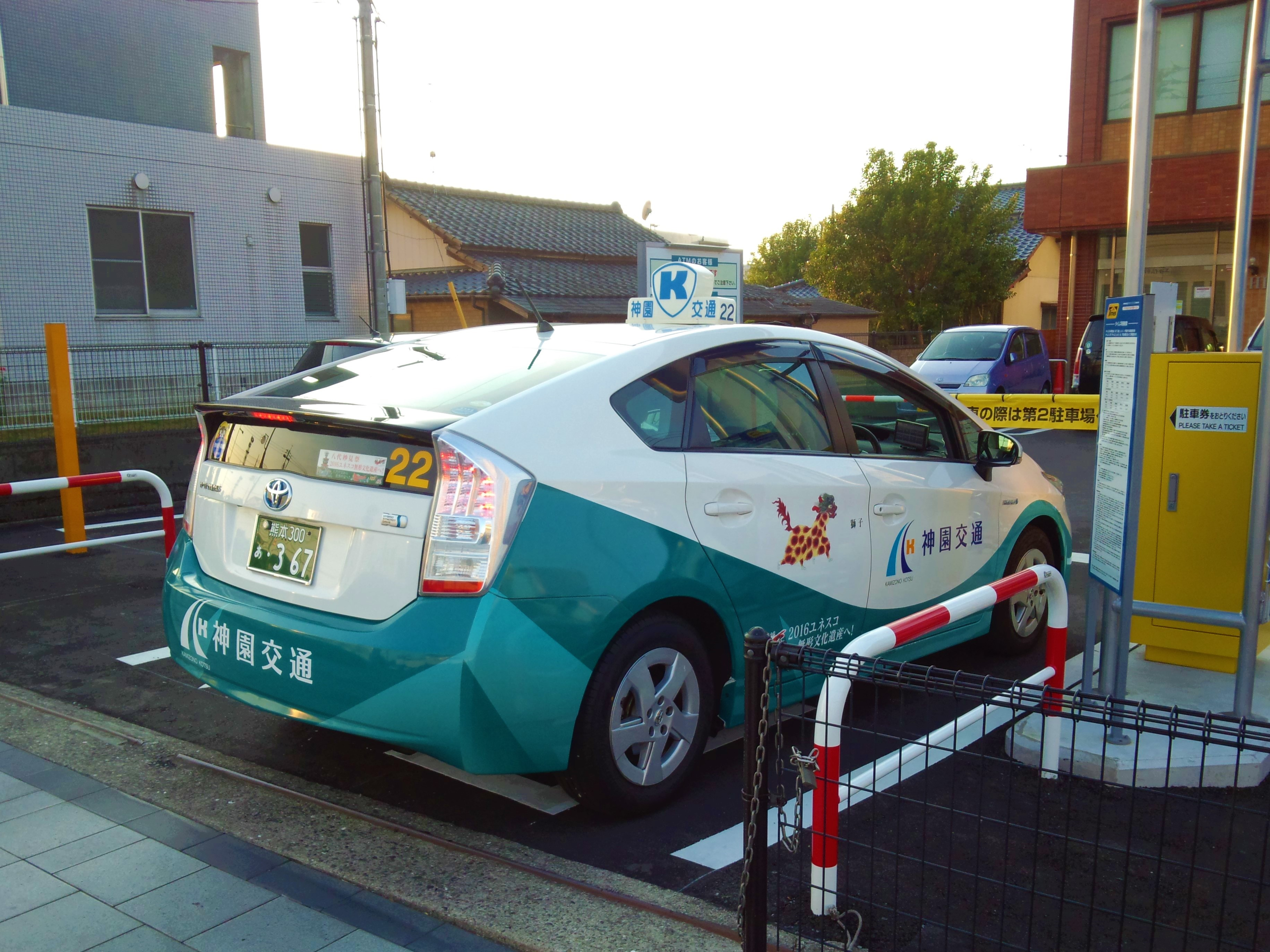 熊本県八代市の神園交通で使われている、トヨタ・プリウスのタクシー